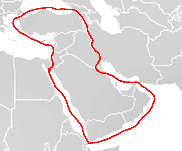 Representación del territorio cubierto por el acuerdo de la línea roja